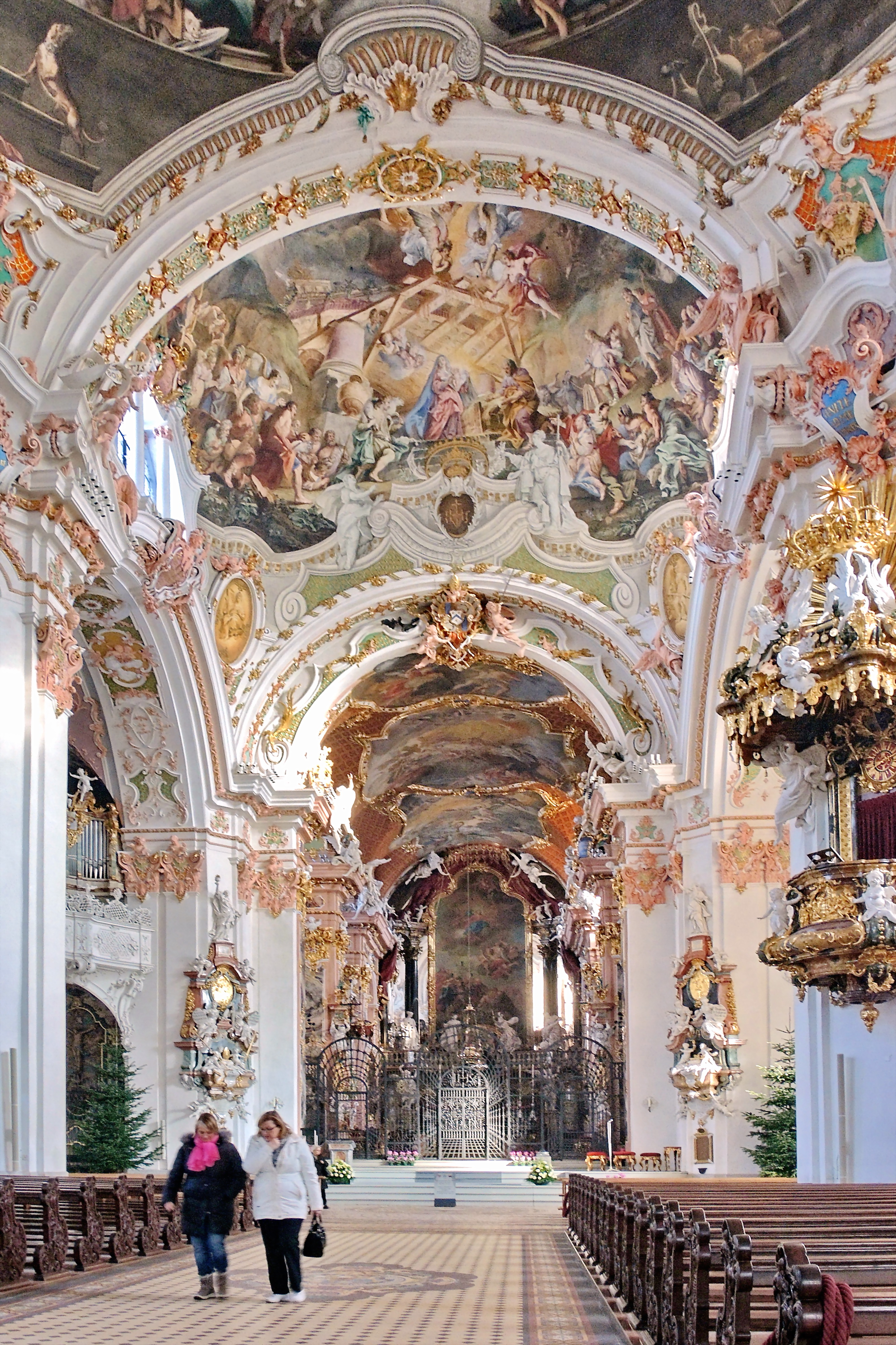 Marienbrunnen,Hauptplatz Kloster Einsiedeln in Einsiedeln (Switzerland)